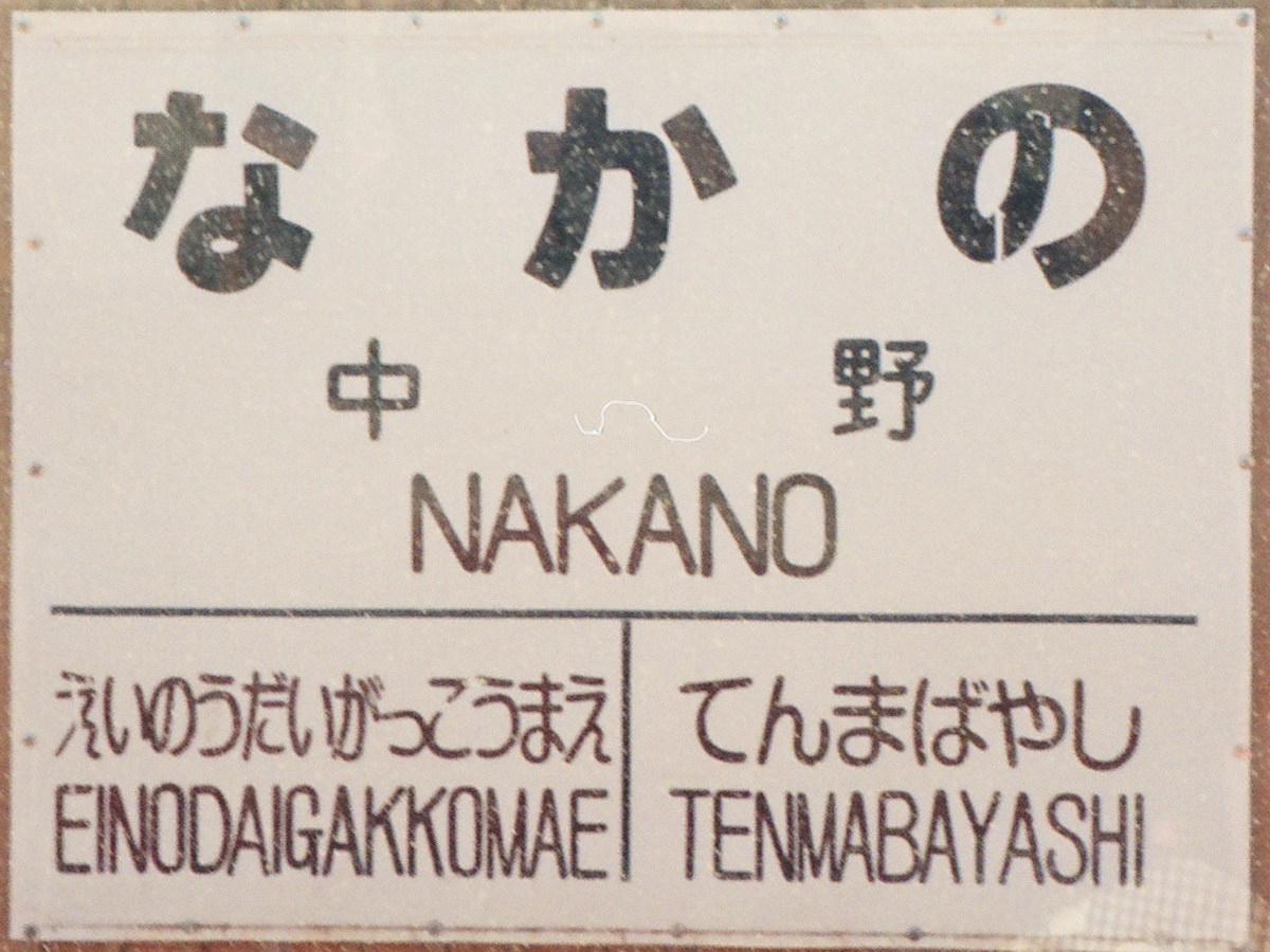 南部縦貫鉄道線 中野駅・駅名板（1997年3月26日撮影）